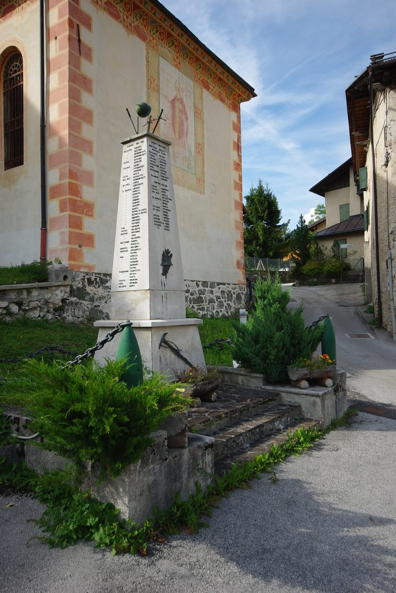 Kriegerdenkmal in Fusine (Val di Zoldo)